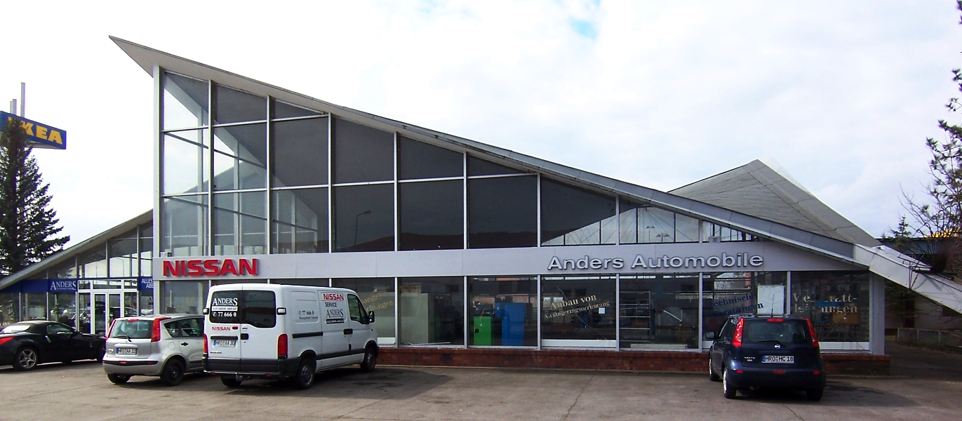 Messehalle der ehemaligen Ostseemesse in Rostock-Schutow